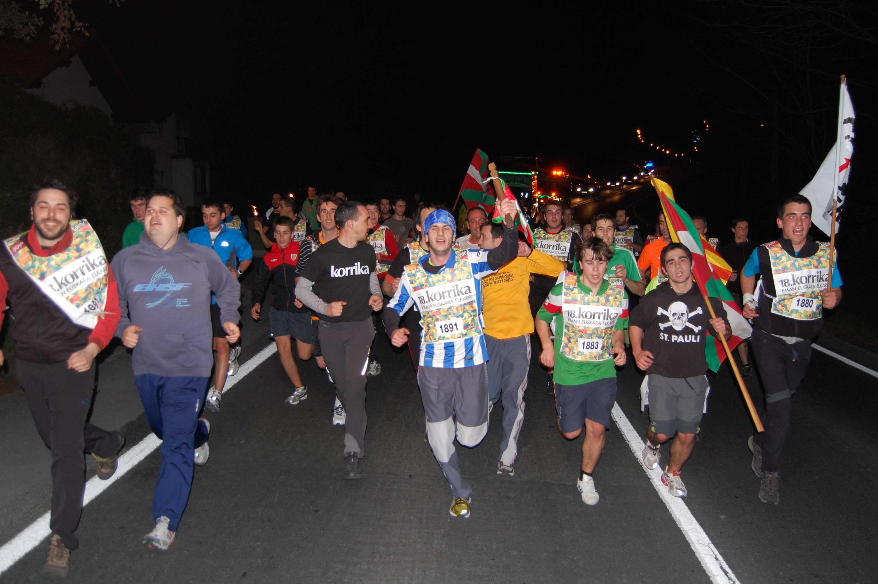 Korrika 18, Arrankudiaga eta Okondon